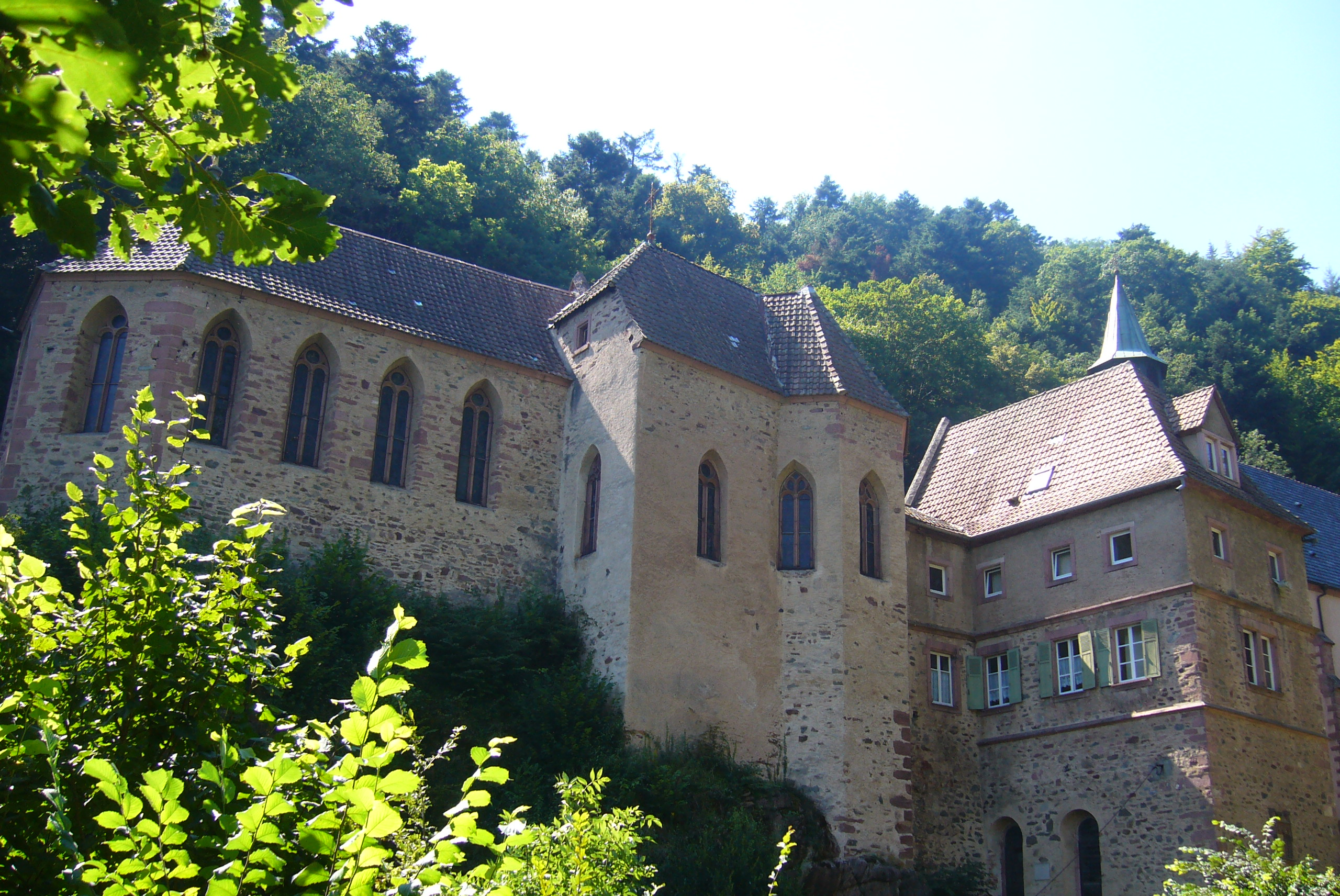 Pèlerinage de Dusenbach, près de Ribeauvillé